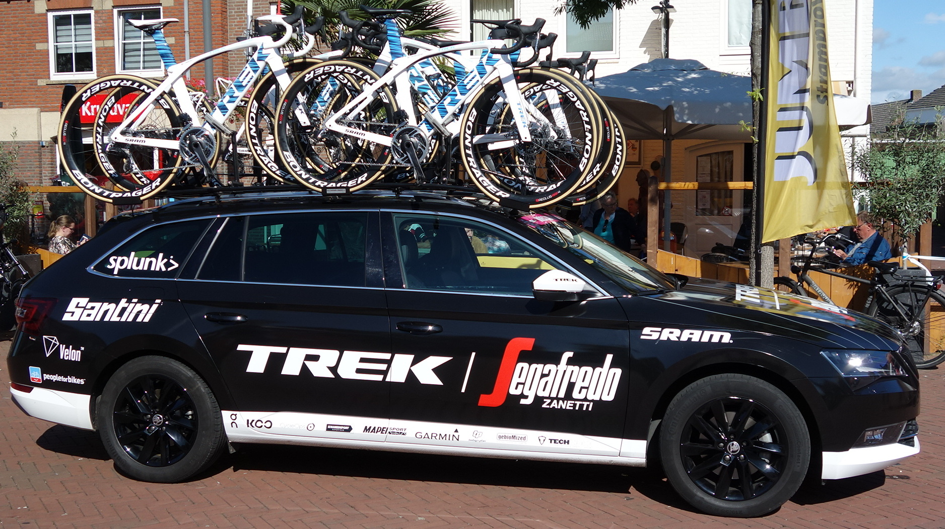 Auto van Trek-Segafredo bij de start van de eerste etappe van Stramproy naar Weert in de Boels Ladies Tour 2019